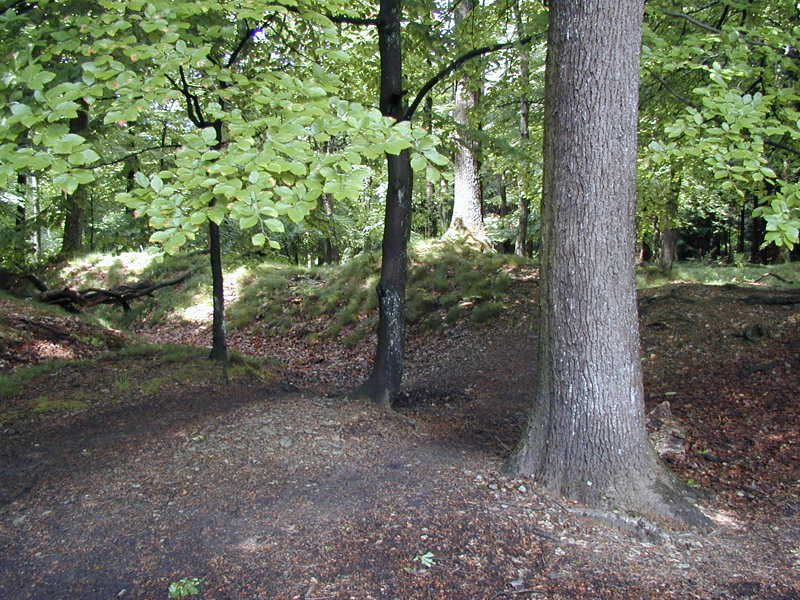 Bergisch Märkische Landwehr